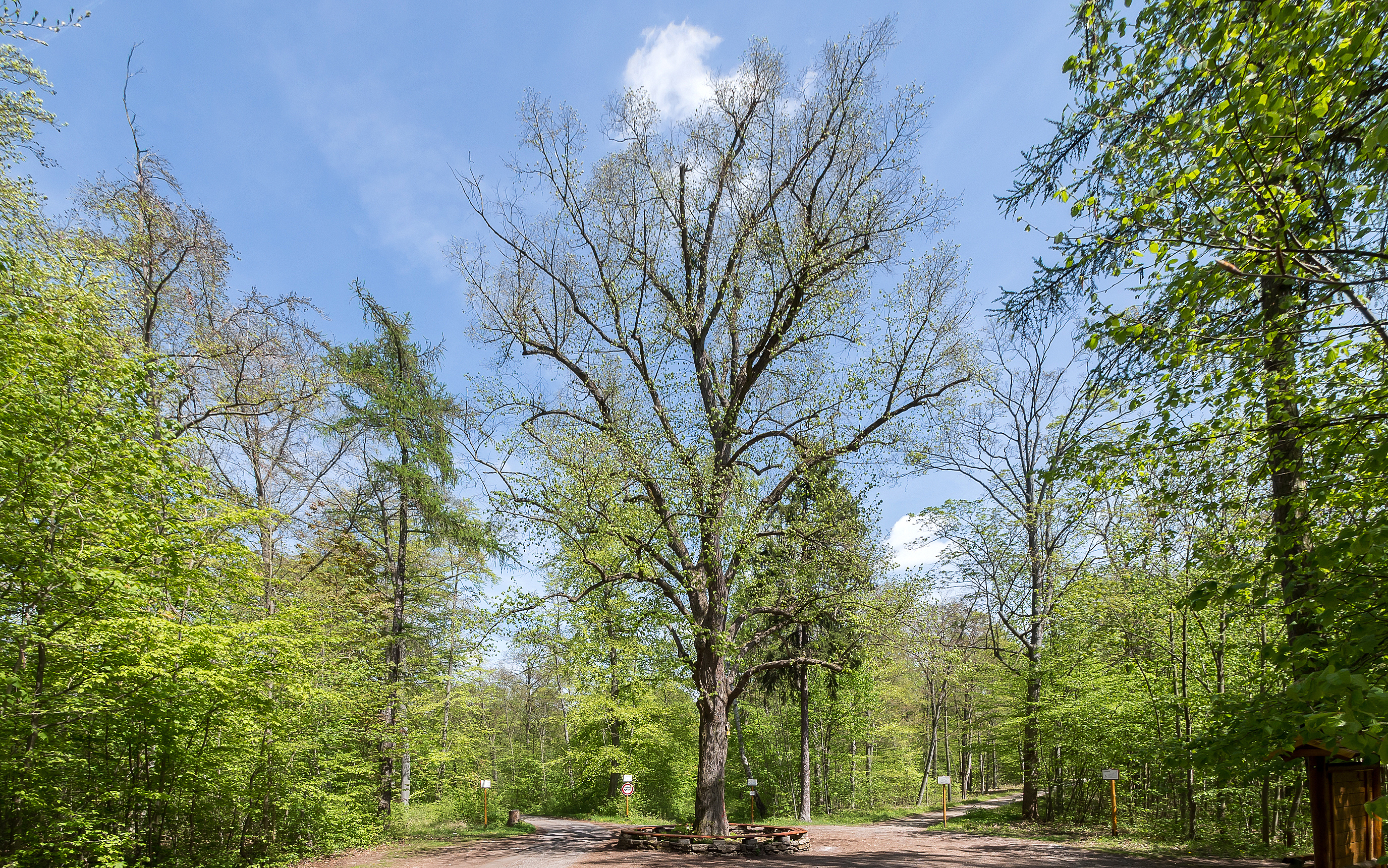 Sommerlinde (Sternlinde) Doc.-Nr. 1996-19 Jena IV